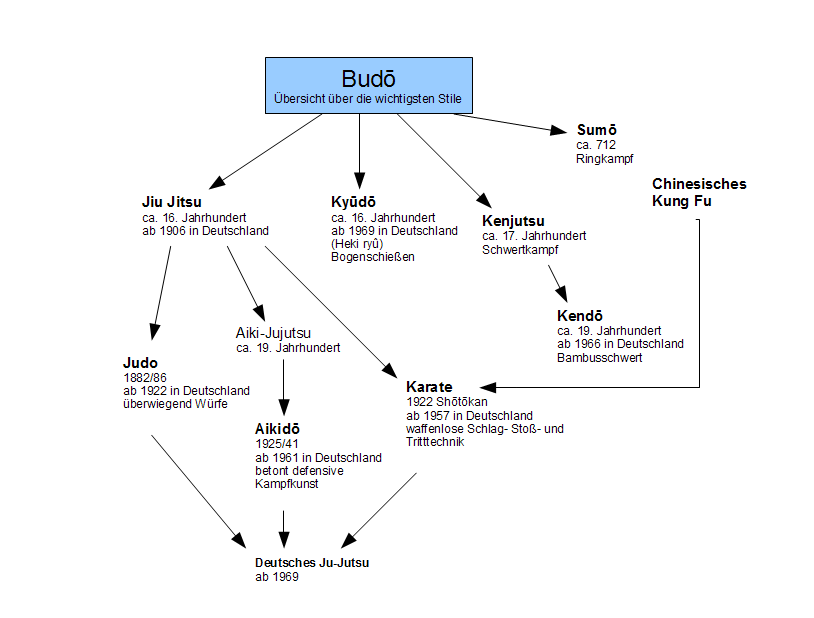 Übersicht über die wichtigsten Budo-Stile (Japan)